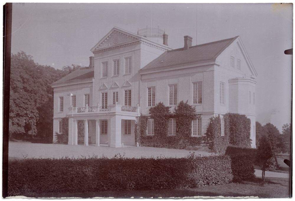 Foto ur Hallwylska museets arkiv. Inventarienummer LXIV:I:N.a.b.30. Hildesborg i Skåne.